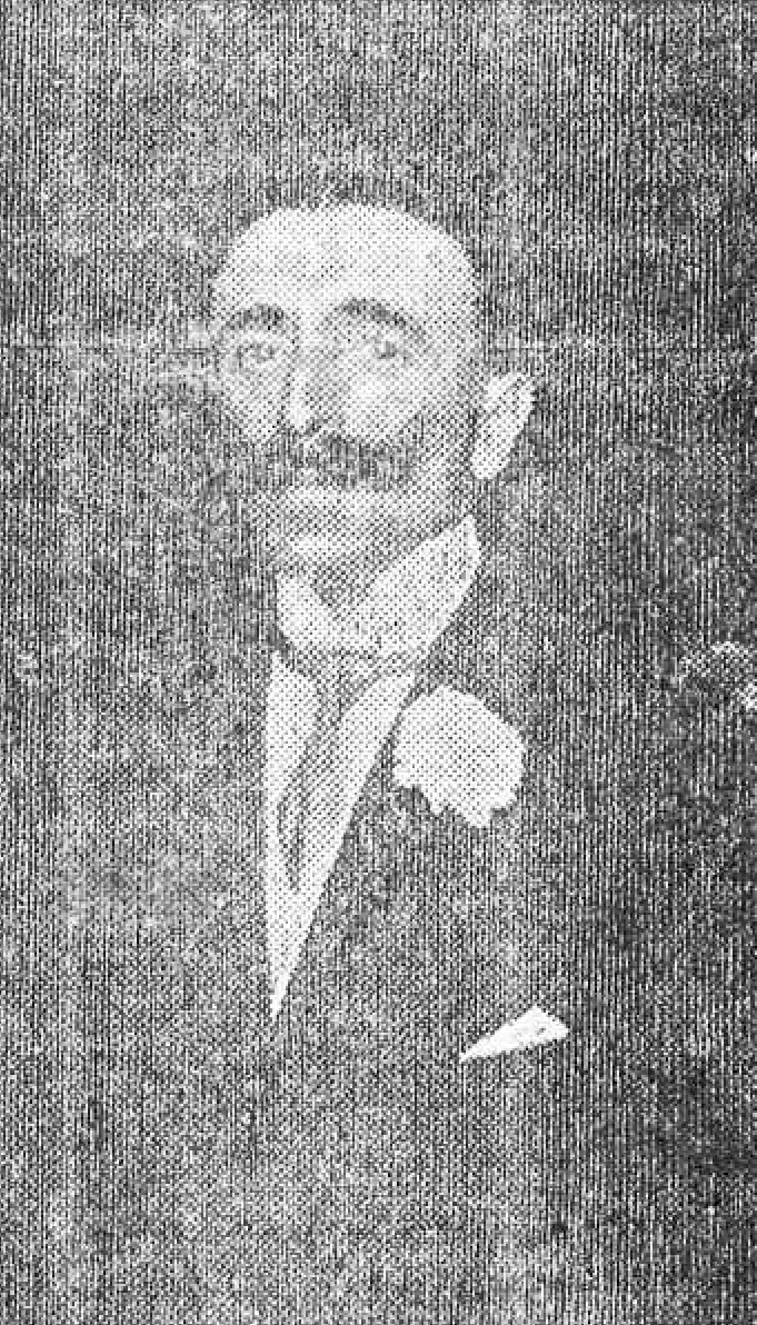 Manuel de Mendívil.